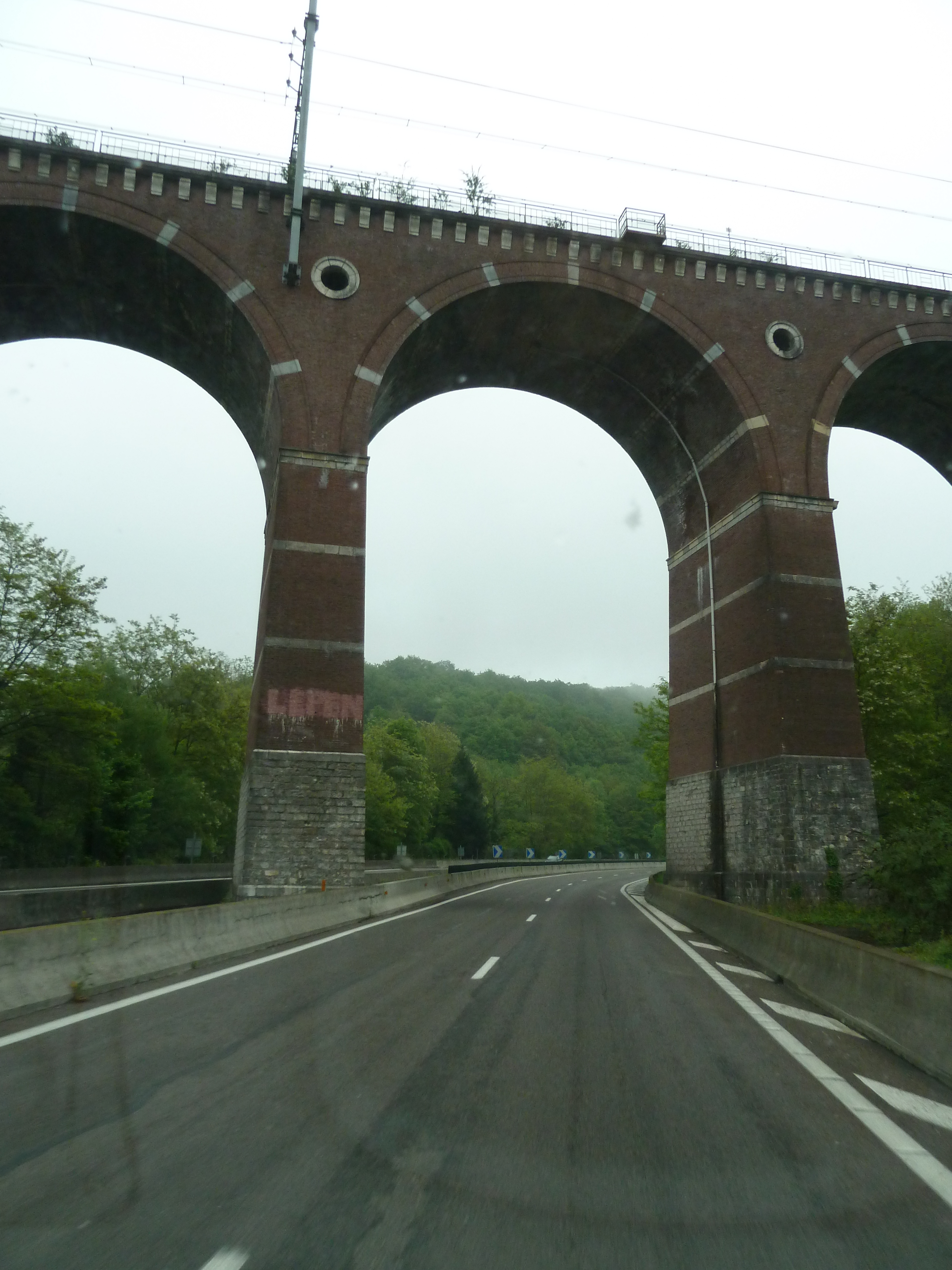 Autoroute A64, E80, France